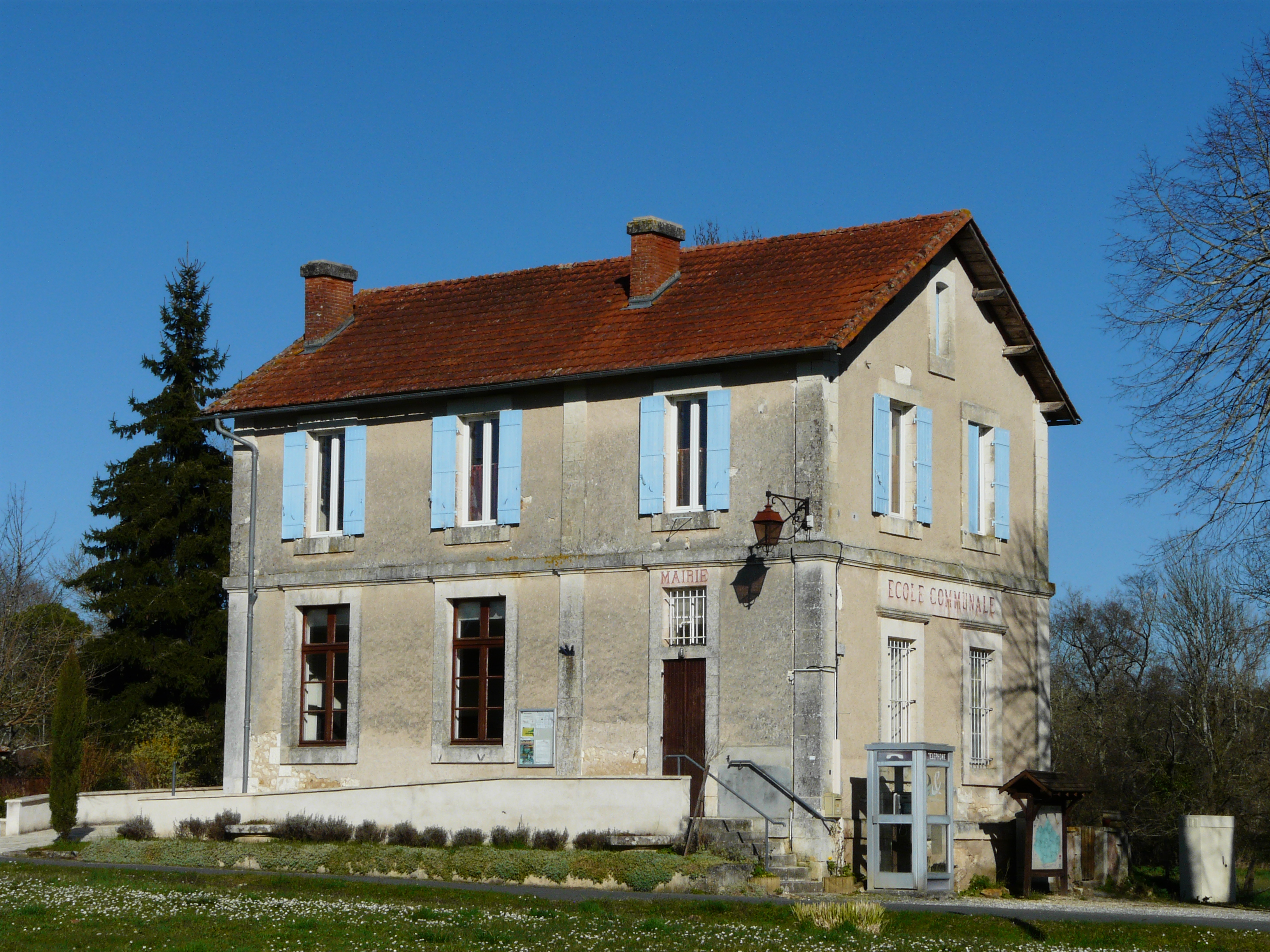 La mairie de Ponteyraud, Dordogne, France.